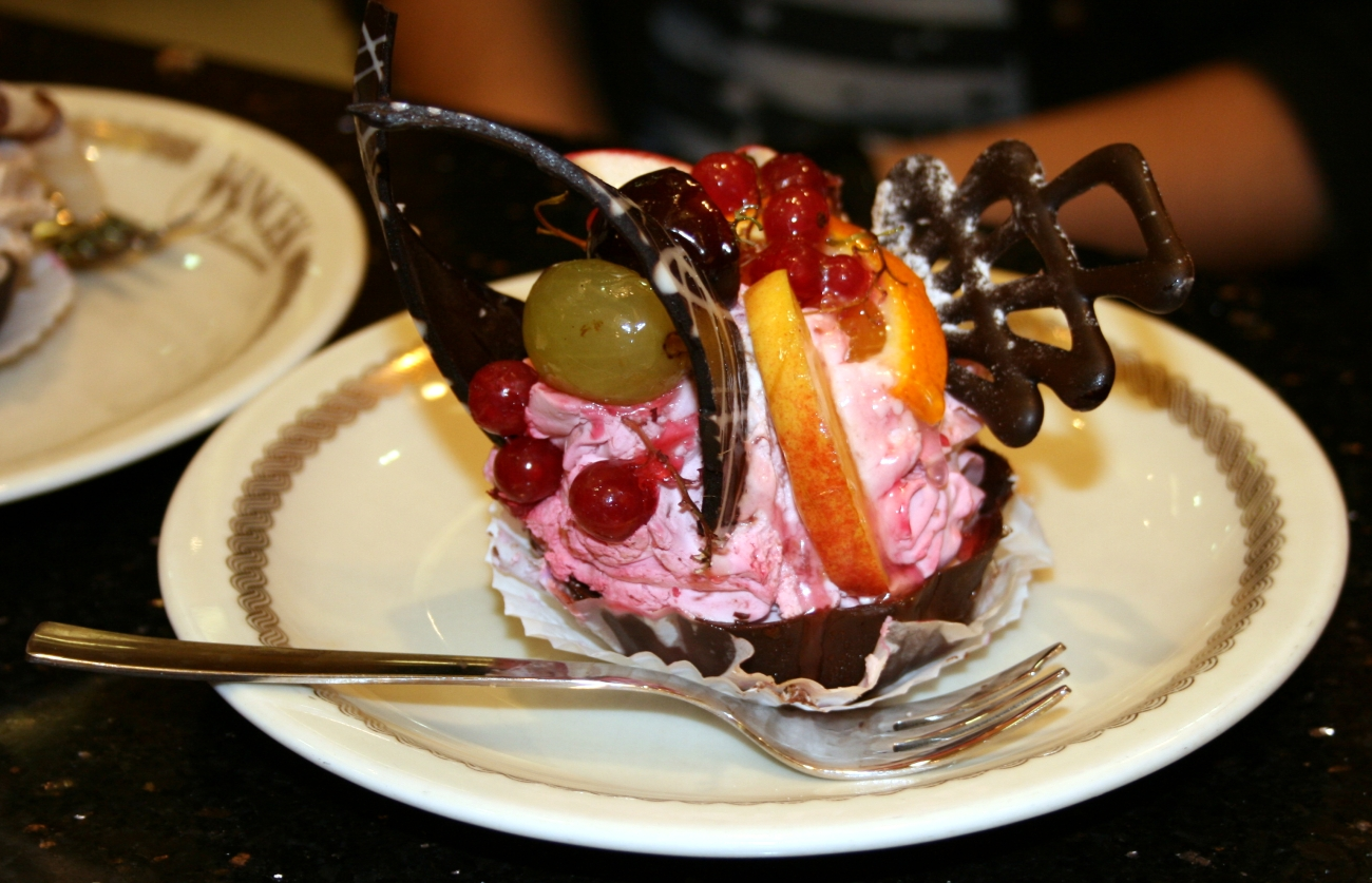 Voćni kolač